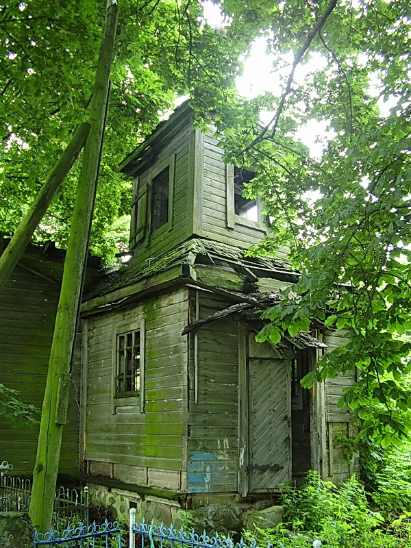 Комсічы. Царква Раства Багародзіцы